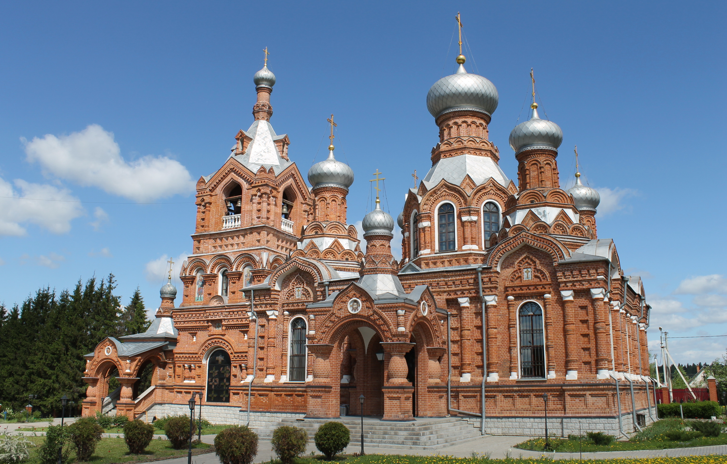 Церковь Воздвижения Животворящего Креста Господня (Москва и Московская область, Истра, село Дарна)